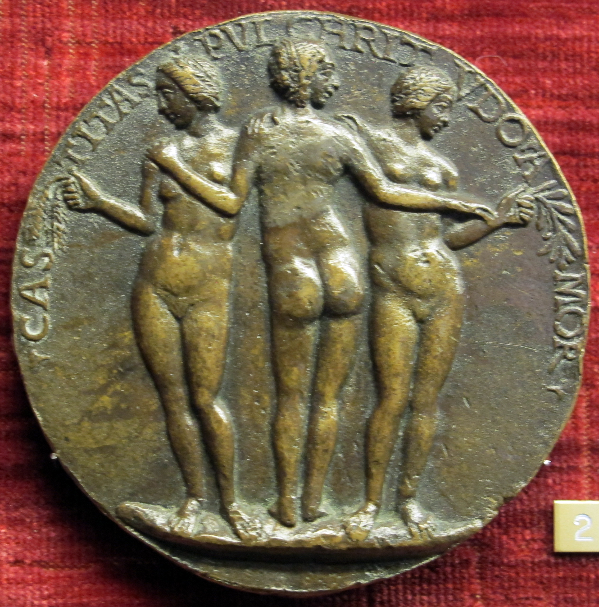 Niccolò di forzore spinelli, medaglia di giovanna tornabuoni, retro con tre grazie